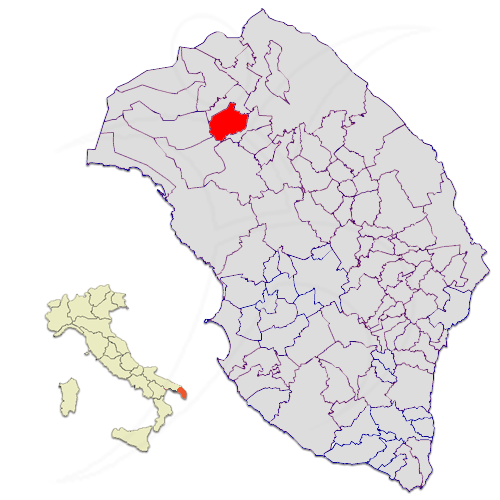 Il territorio del comune di Carmiano nella Provincia di Lecce